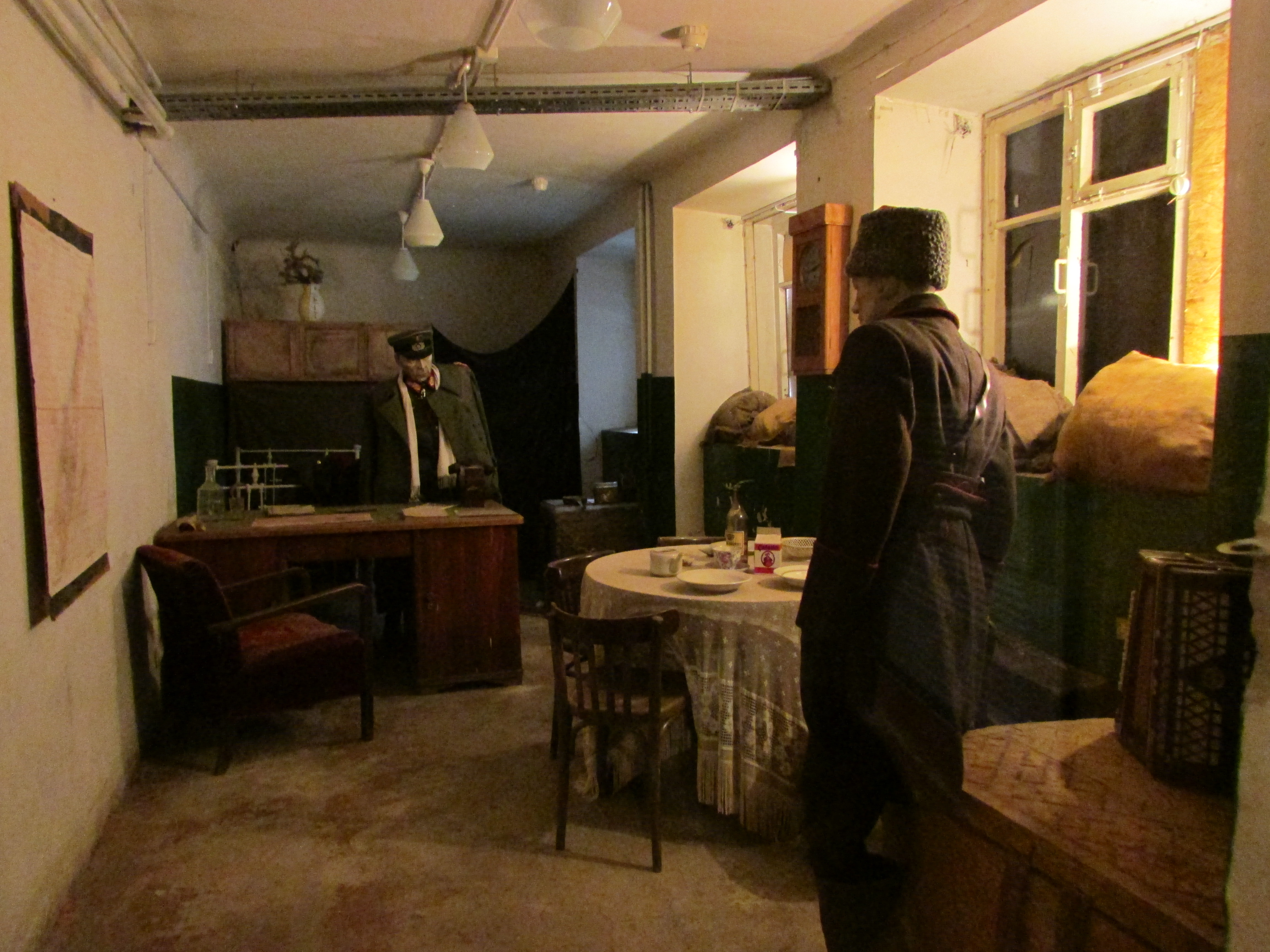 Часть экспозиции музея "Память" (отдела Музея-заповедника "Сталинградская битва") - комната Фридриха Паулюса